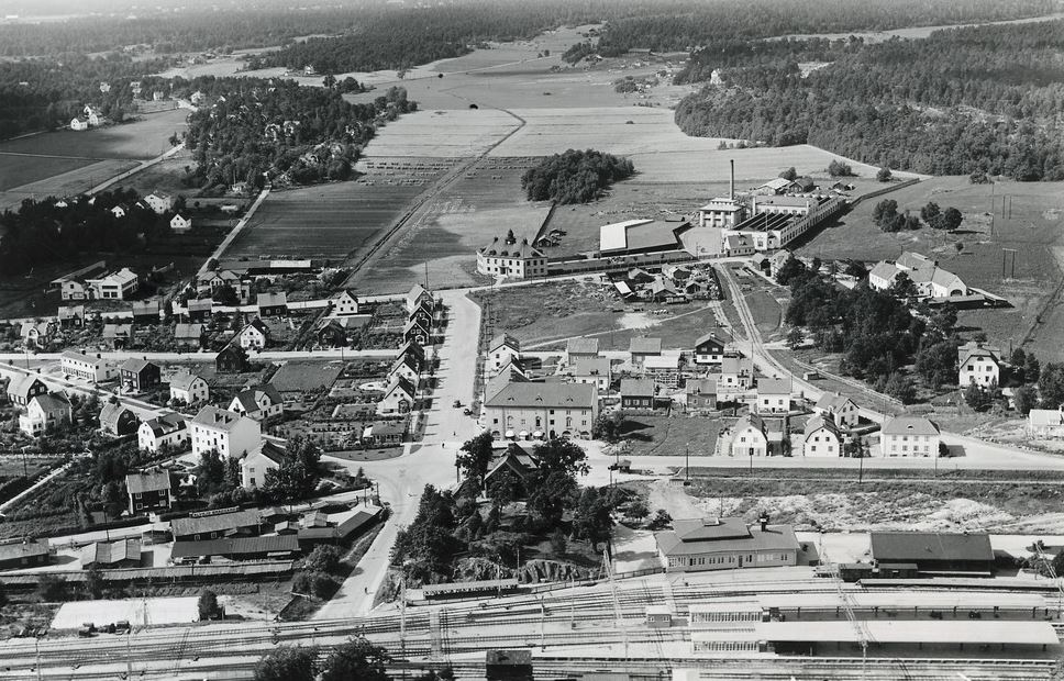 Vy över Älvsjö och Solberga med Älvsjö station längst fram och LM Ericssons kabelverk och "Klockhuset" i bakgrunden.